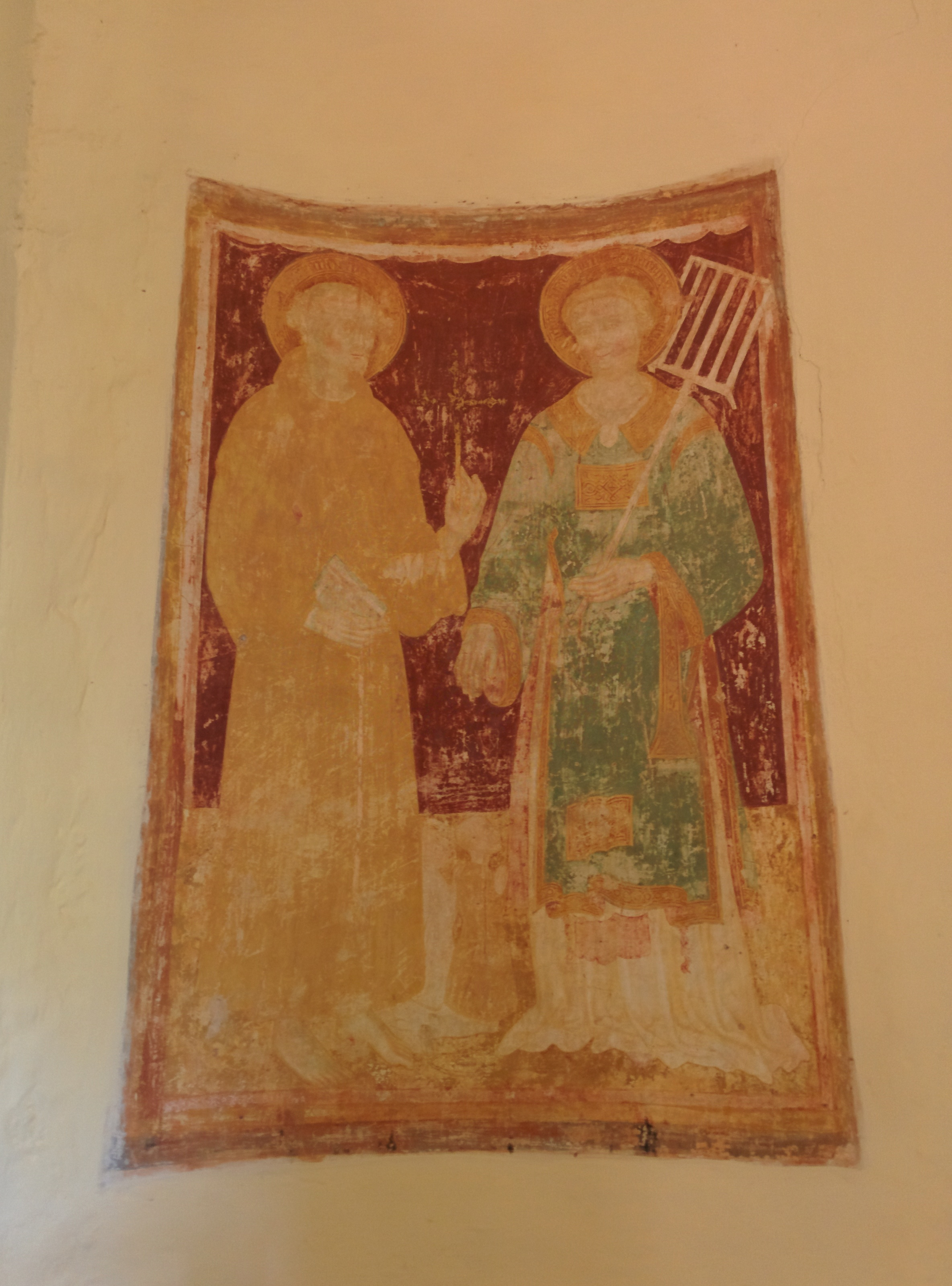 Affresco raffigurante i santi Francesco e Lorenzo nella chiesa di San Lorenzo a Castelnovo di Isola Vicentina, in provincia di Vicenza.